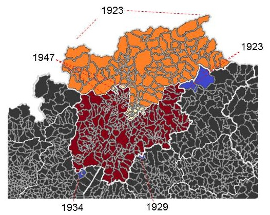 Comuni e data di cambio provincia